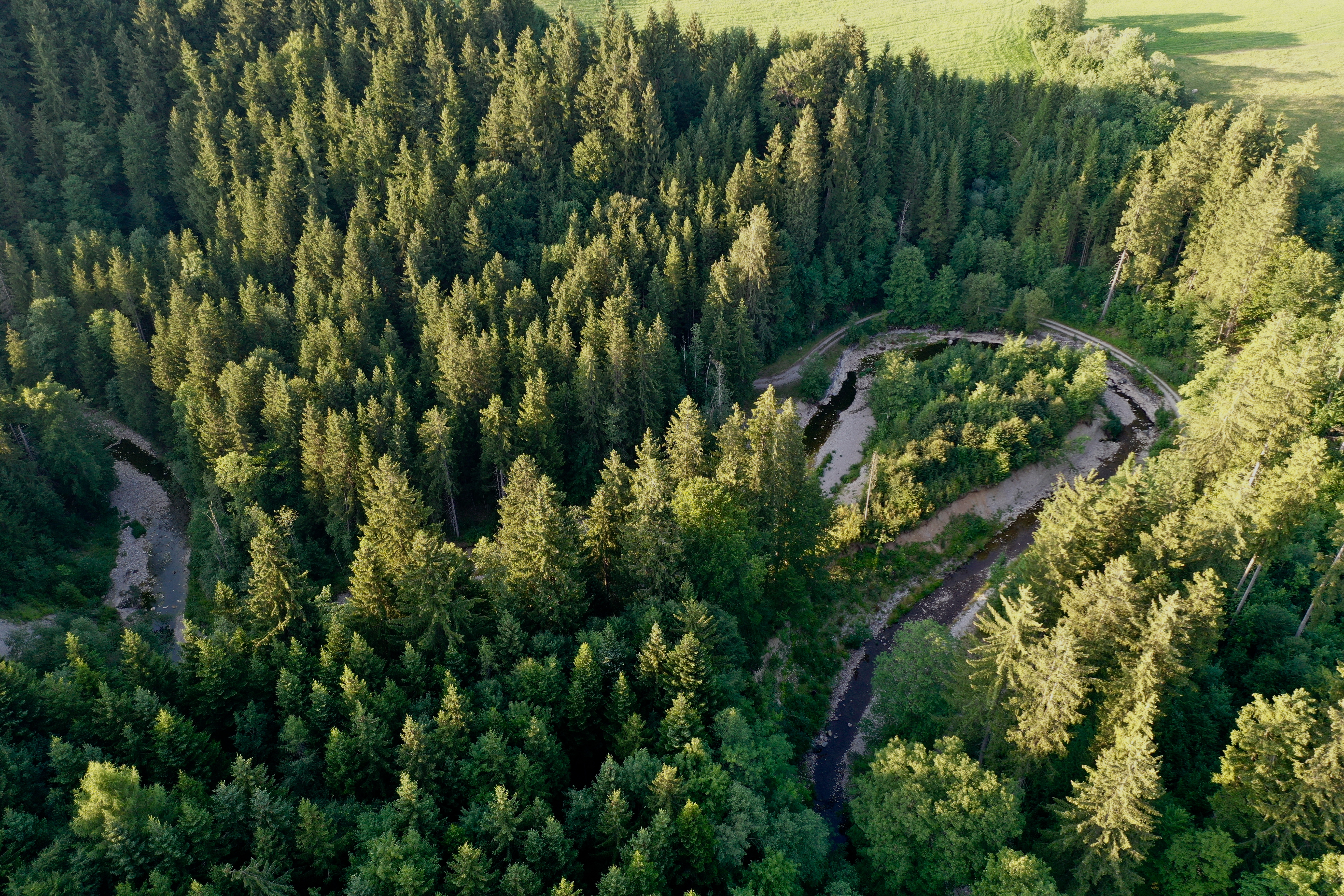 Der Wielenbach-Mäander südlich von Birkland bildet eine Haarnadel-Schleife.